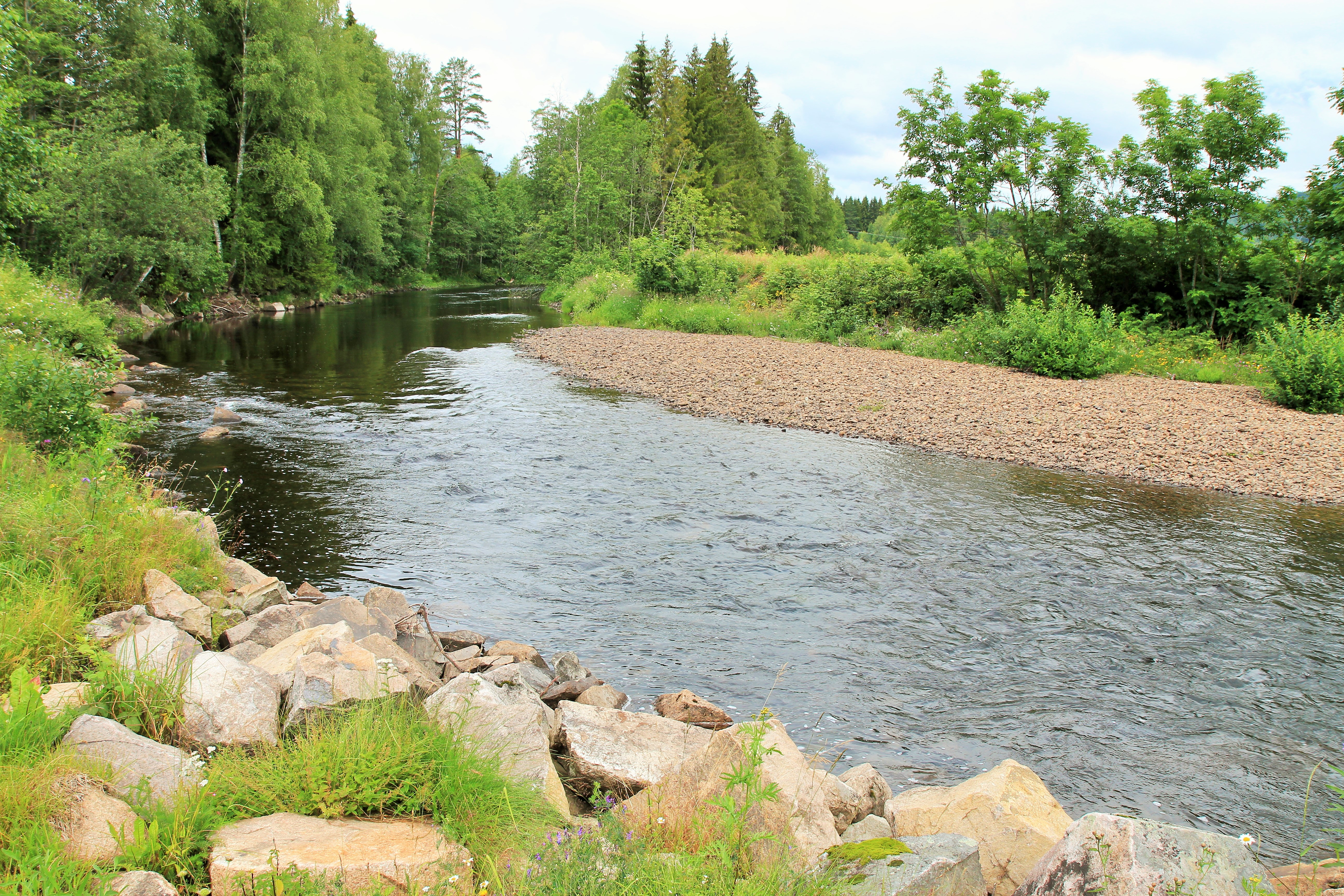 Hurdalselva